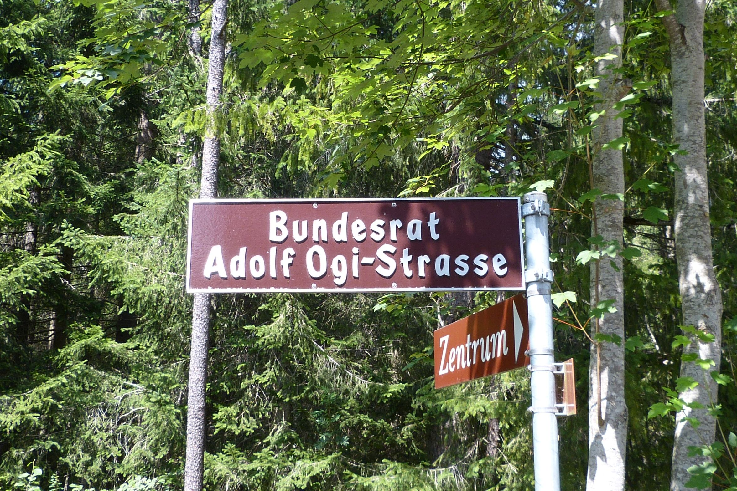 Strassenschild der Adolf-Ogi-Strasse in Kandersteg.